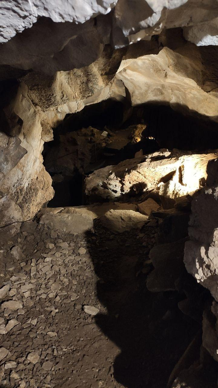 Entorno del pueblo de Llamazares, Valdelugueros, León, España